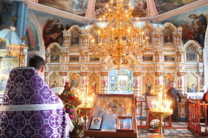 Iconostasul din biserica